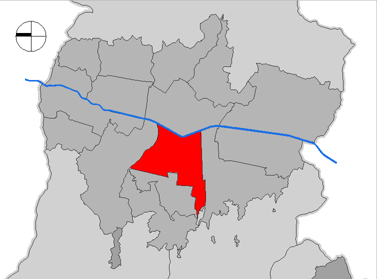 mapa de la comuna Laureles-Estadio. Medellín, Colombia.